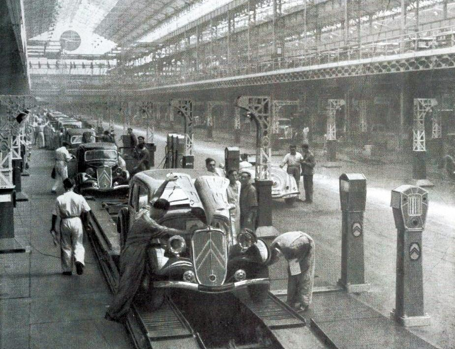 La chaîne de montage de la Traction Avant en 1934 (1ère année).